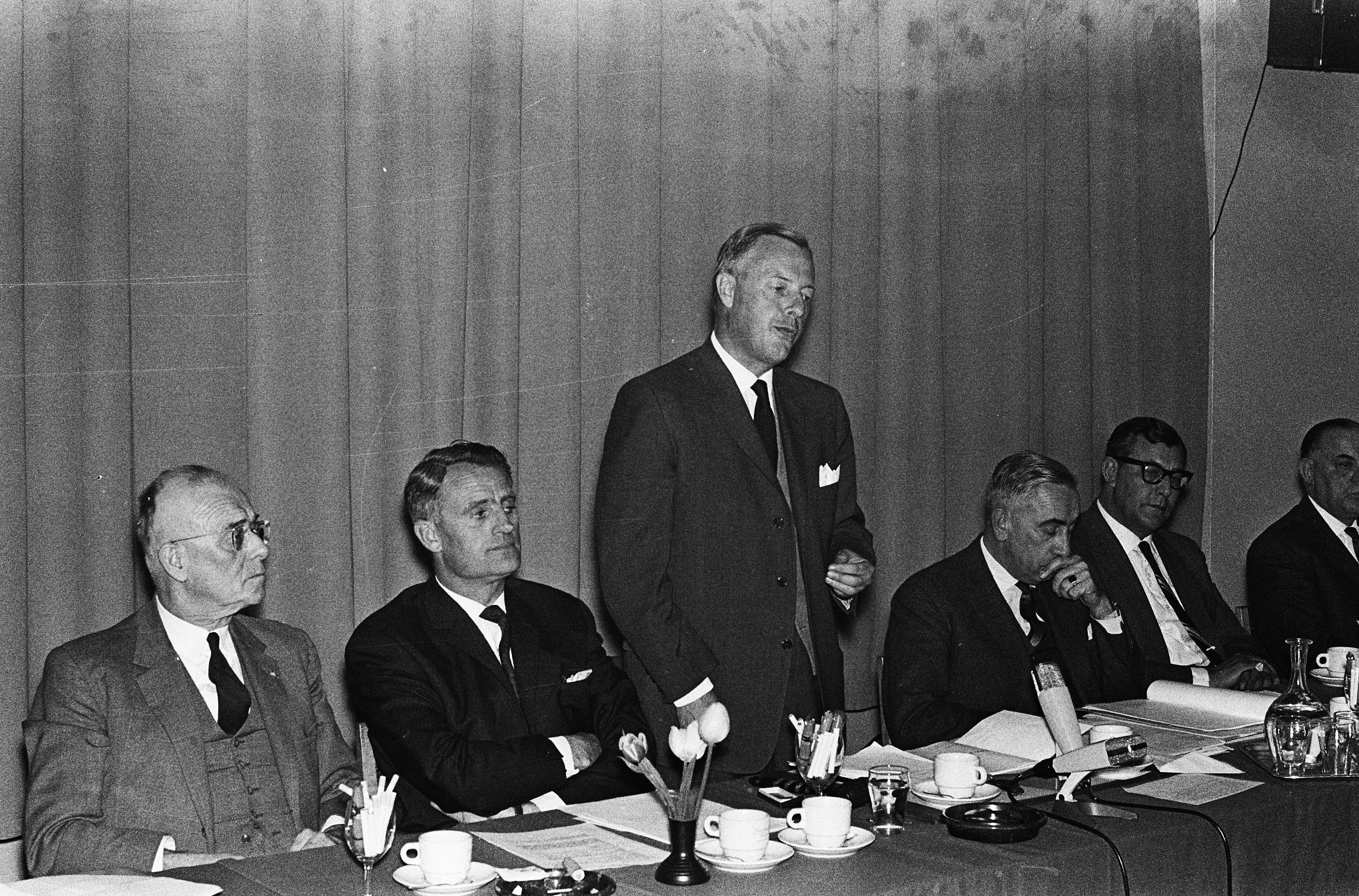 Collectie / Archief : Fotocollectie Anefo Reportage / Serie : [ onbekend ] Beschrijving : In Jaarbeursgebouw de Nederlandse Sport Federatie bijeengekomen Datum : 23 april 1963 Locatie : Utrecht Fotograaf : Gelderen, Hugo van / Anefo Auteursrechthebbende : Nationaal Archief Materiaalsoort : Negatief (zwart/wit) Nummer archiefinventaris : bekijk toegang 2.24.01.05 Bestanddeelnummer : 915-0779